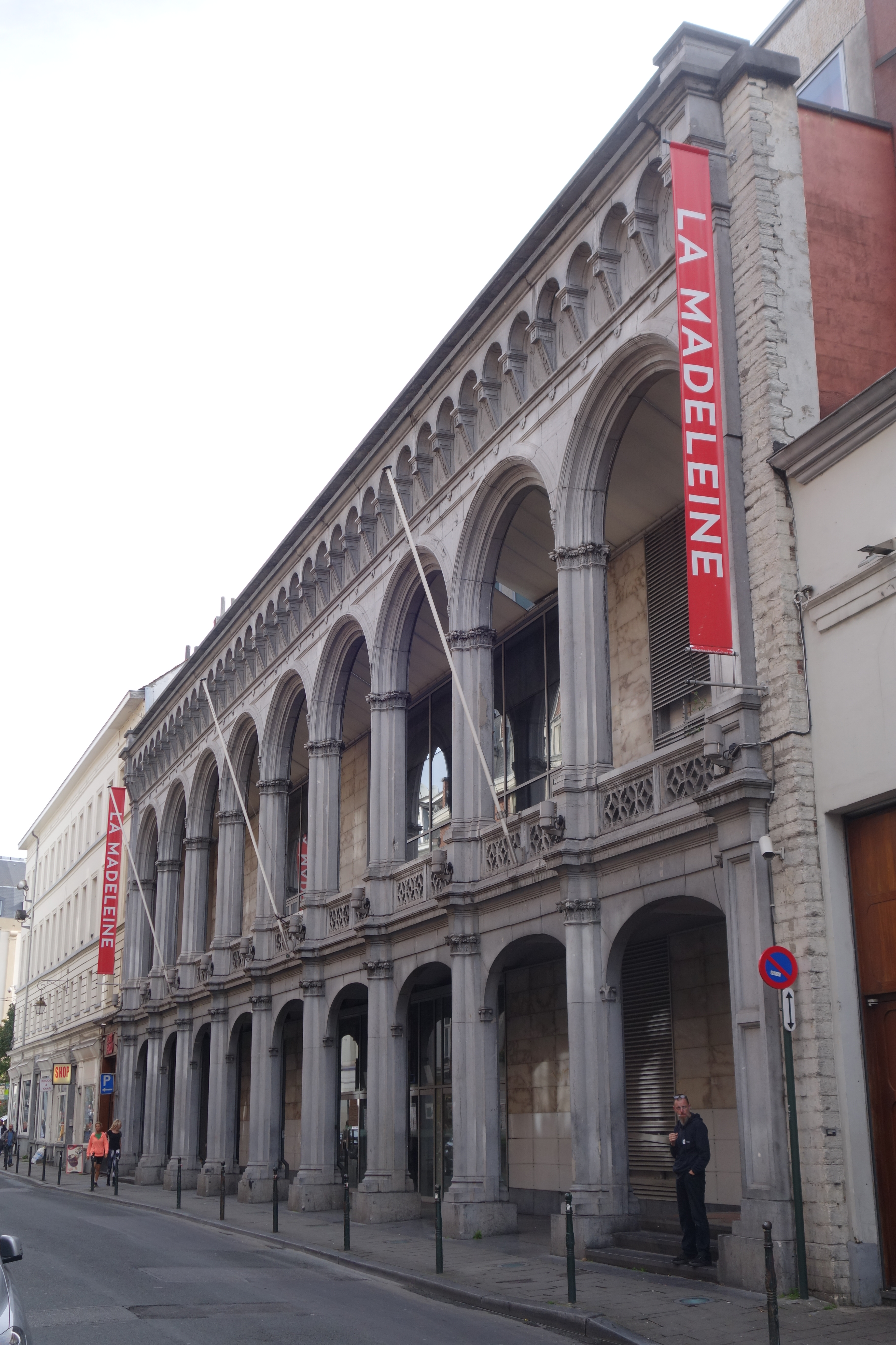 Magdalenazaal